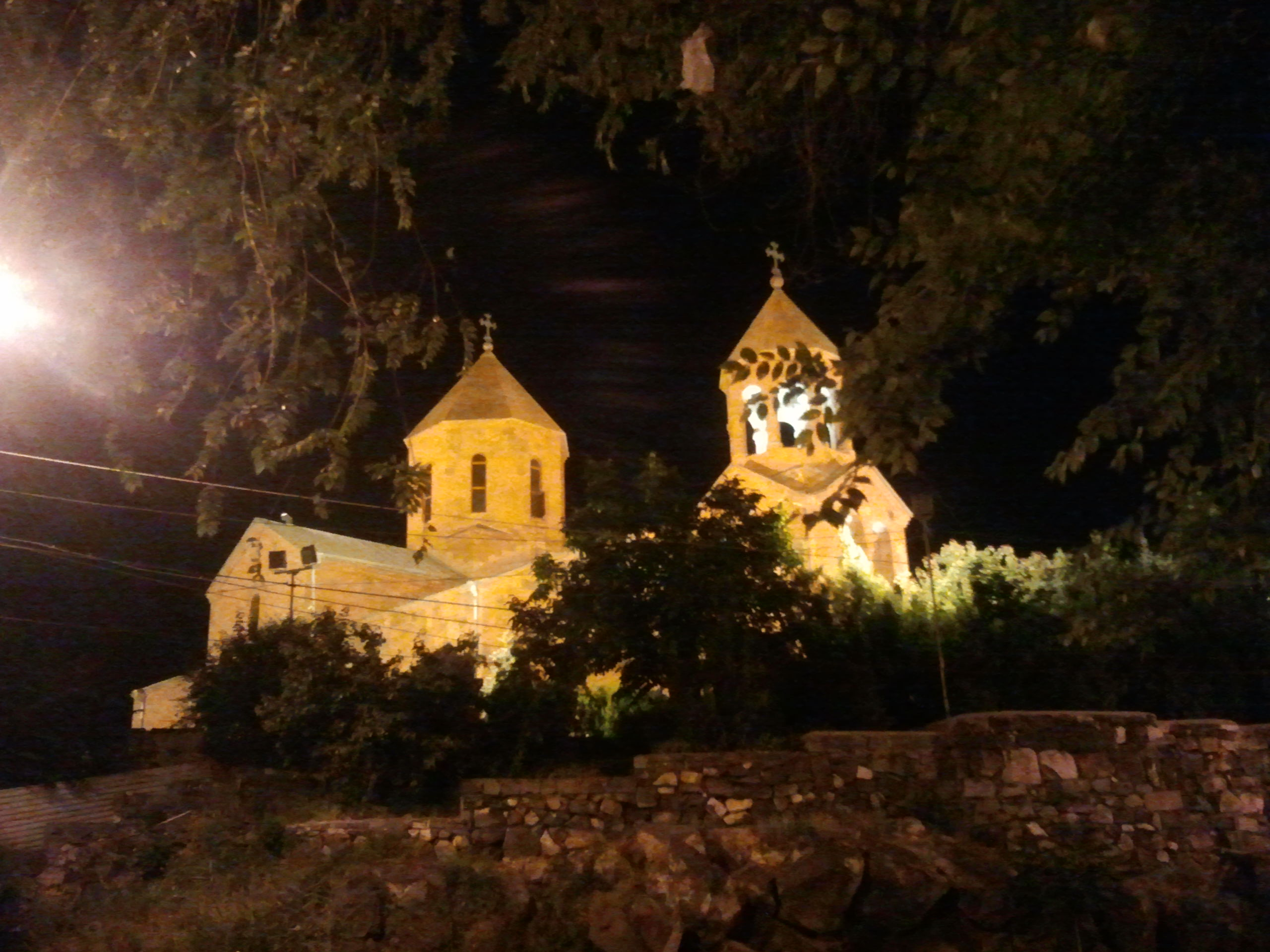 Սբ. Հովհաննես եկեղեցին գիշերը 6/74